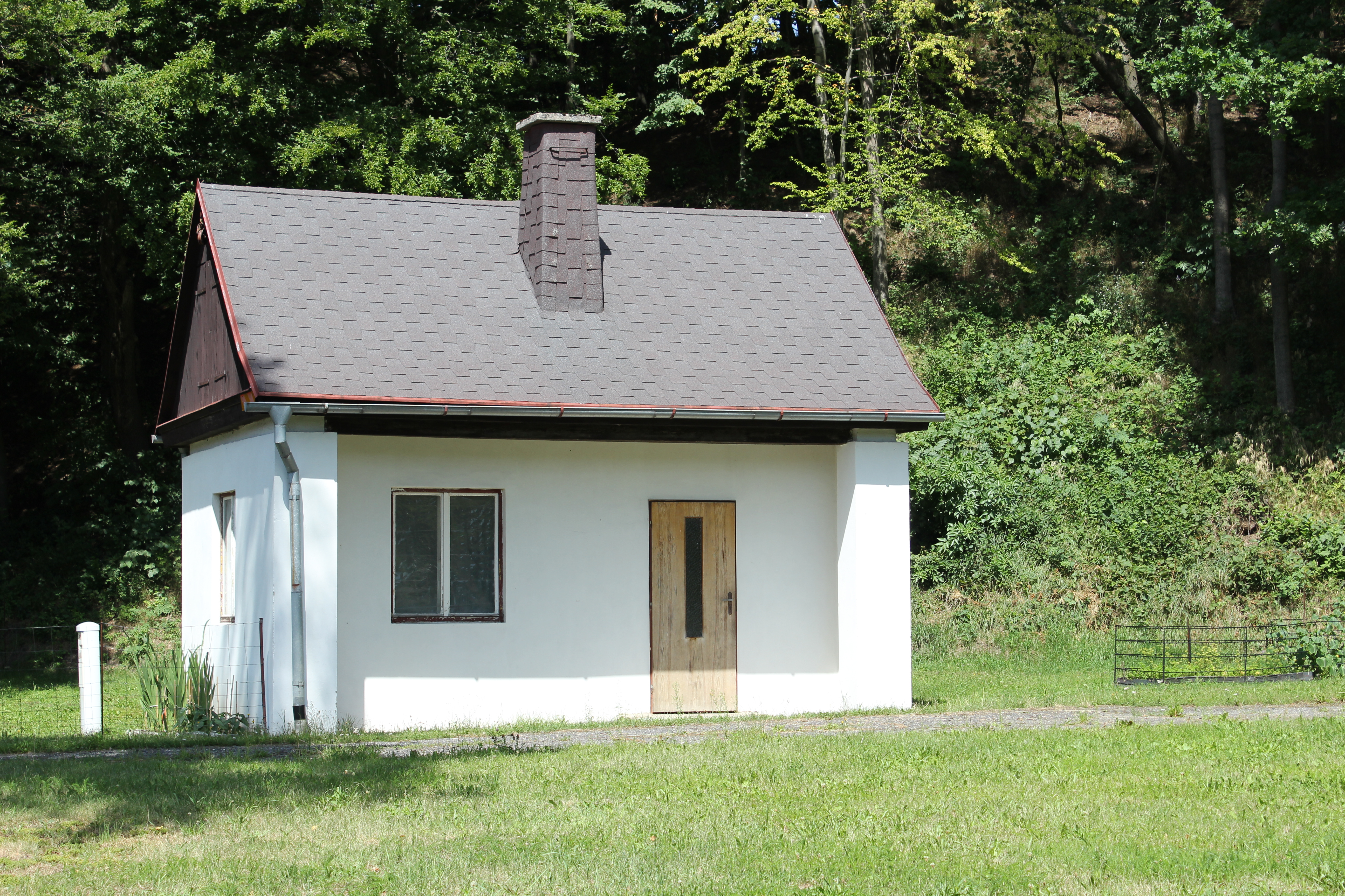 Objekt někdejší železniční zastávky Heřmanice.